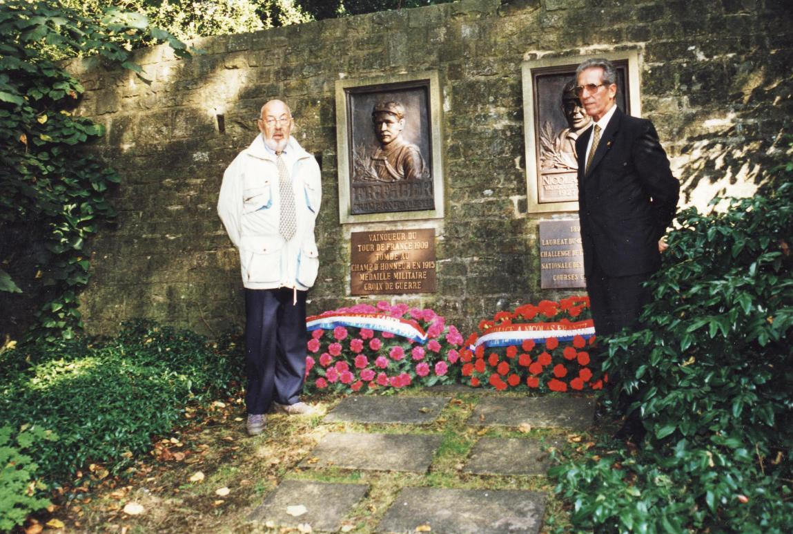 Charly Gaul (1932-2005) et Federico Bahamontes (*1928) en 1998 devant le mémorial des cyclistes François Faber (1887-1915) et Nicolas Frantz (1899-1985) au parc de la ville de Luxembourg